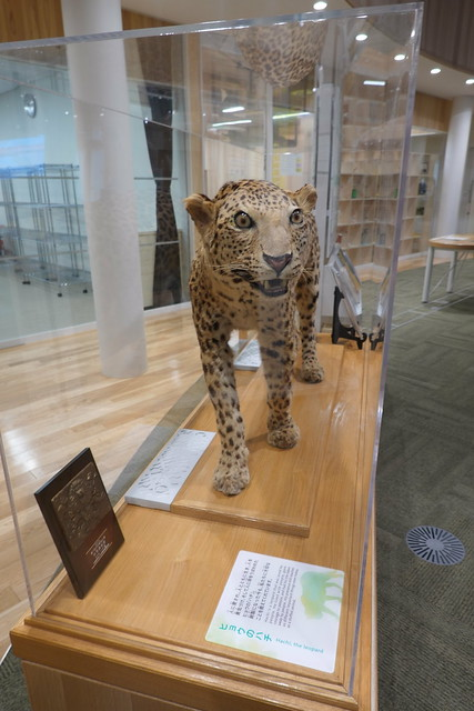 戦時猛獣処分の対象になったハチの剥製（2019年4月、オーテピア）